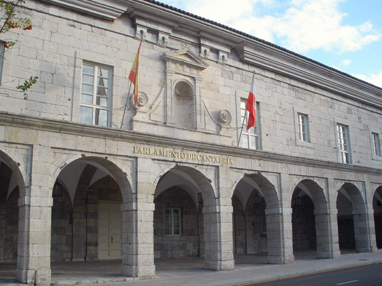 Santander - Antiguo Hospital de San Rafael (Parlamento de Cantabria)